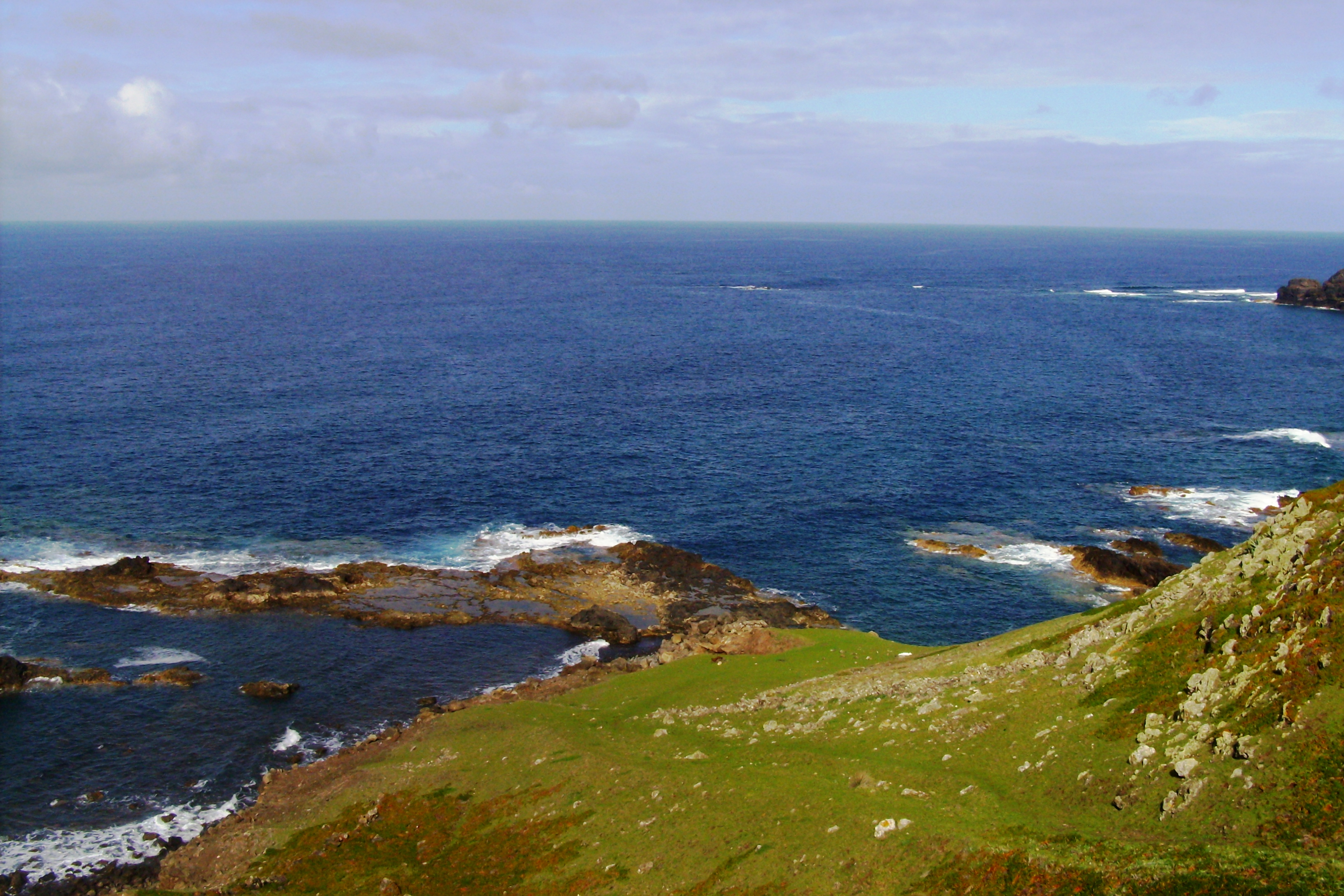 Forte do Cabrestante, freguesia de Vila do Porto, concelho de Vila do Porto, ilha de Santa Maria, Açores: vista panorâmica.